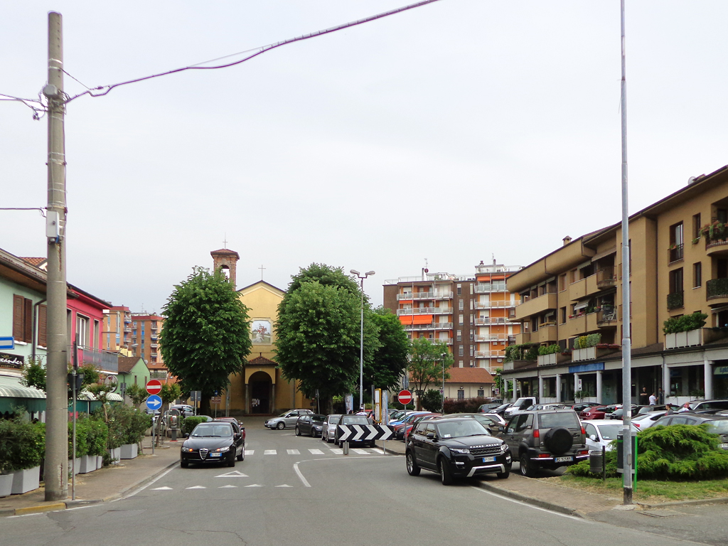 Peschiera Borromeo, la piazza della frazione di Zeloforamagno.